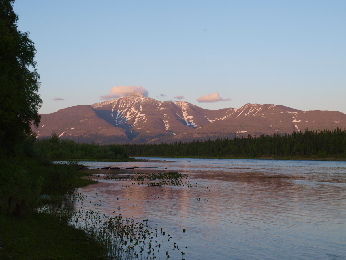 Вид на Тельпос-из от устья реки Тельпос